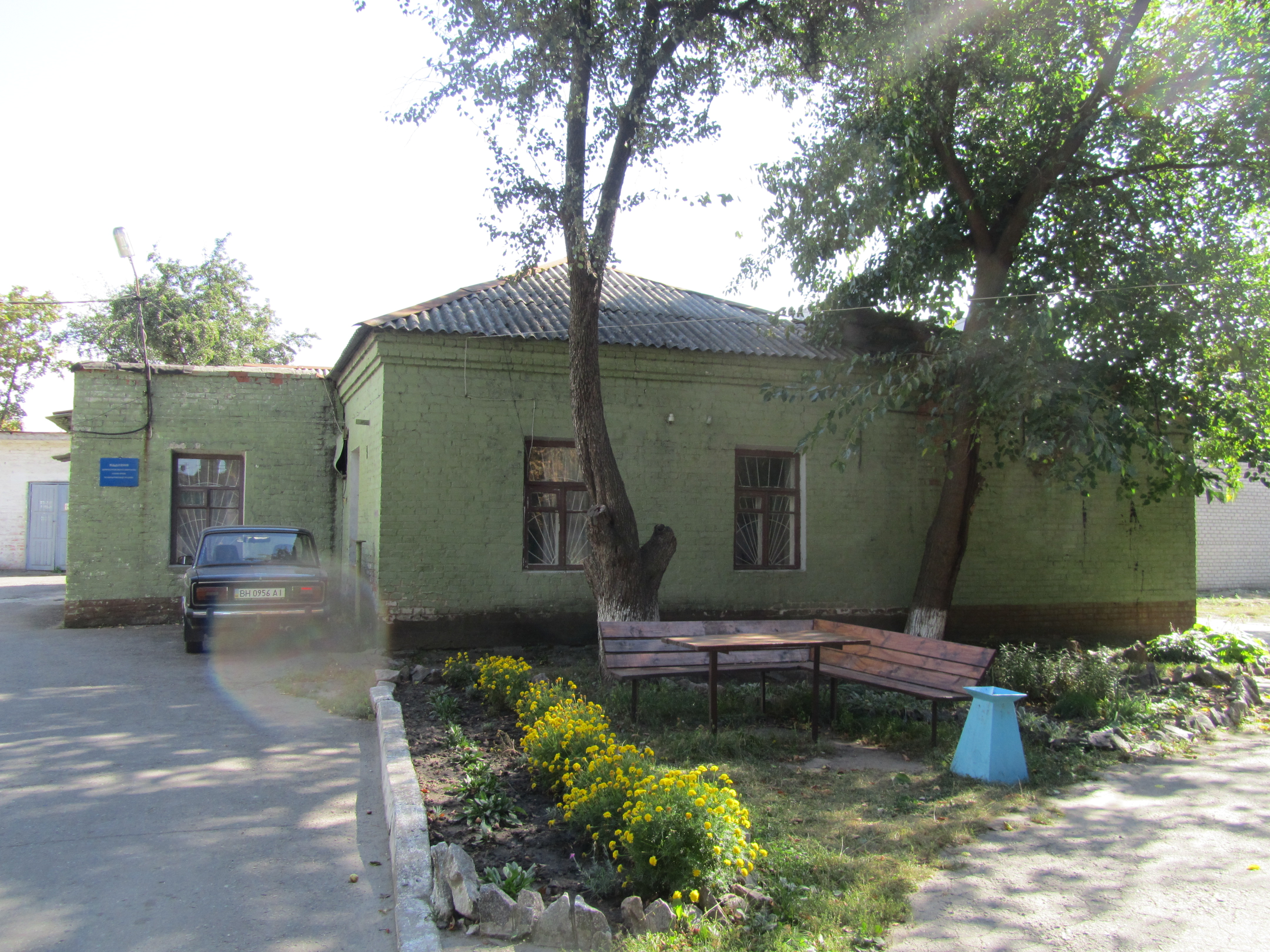 Кременчуцька станція переливання крові - Відділення довгострокового зберігання клітин крові та карантинізації плазми